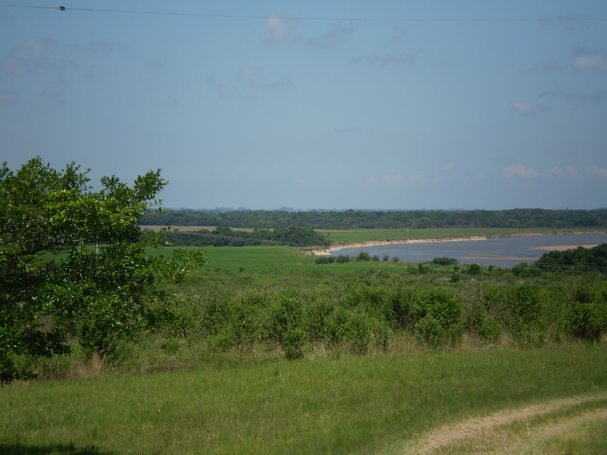 Rio Camaquã in Cristal, Rio Grande do Sul, Brazil.